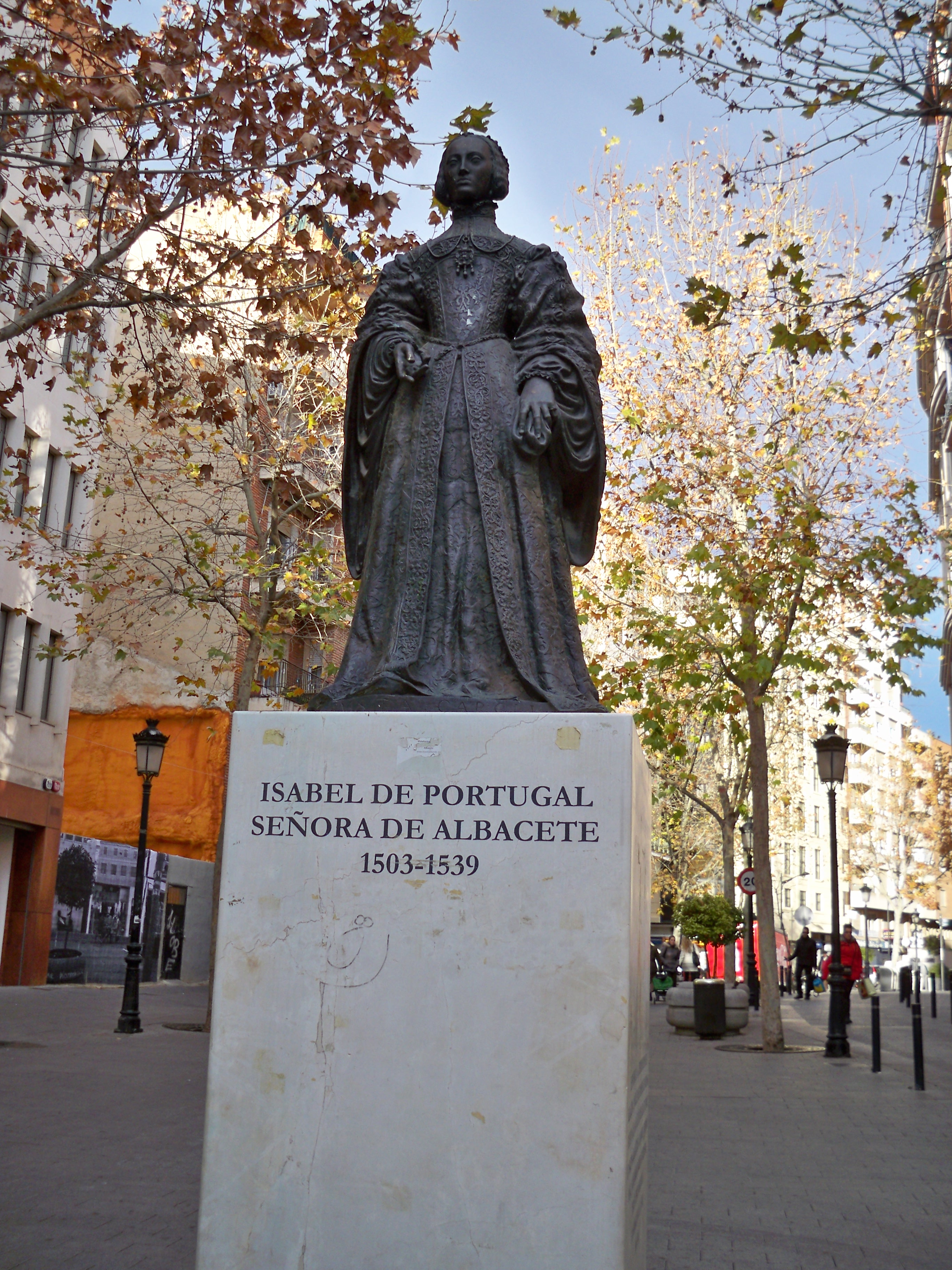 Escultura de la Emperatriz Isabel de Portugal situada en pleno centro de Albacete